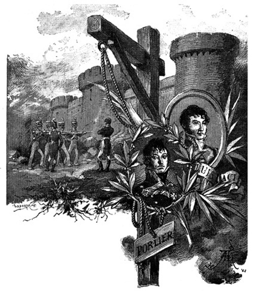 Ilustración de La segunda casaca de Benito Pérez Galdós; ilustrado por Mélida y Pellicer. Madrid, Administración de La Guirnalda y Episodios Nacionales, 1884, pp. 1-214.